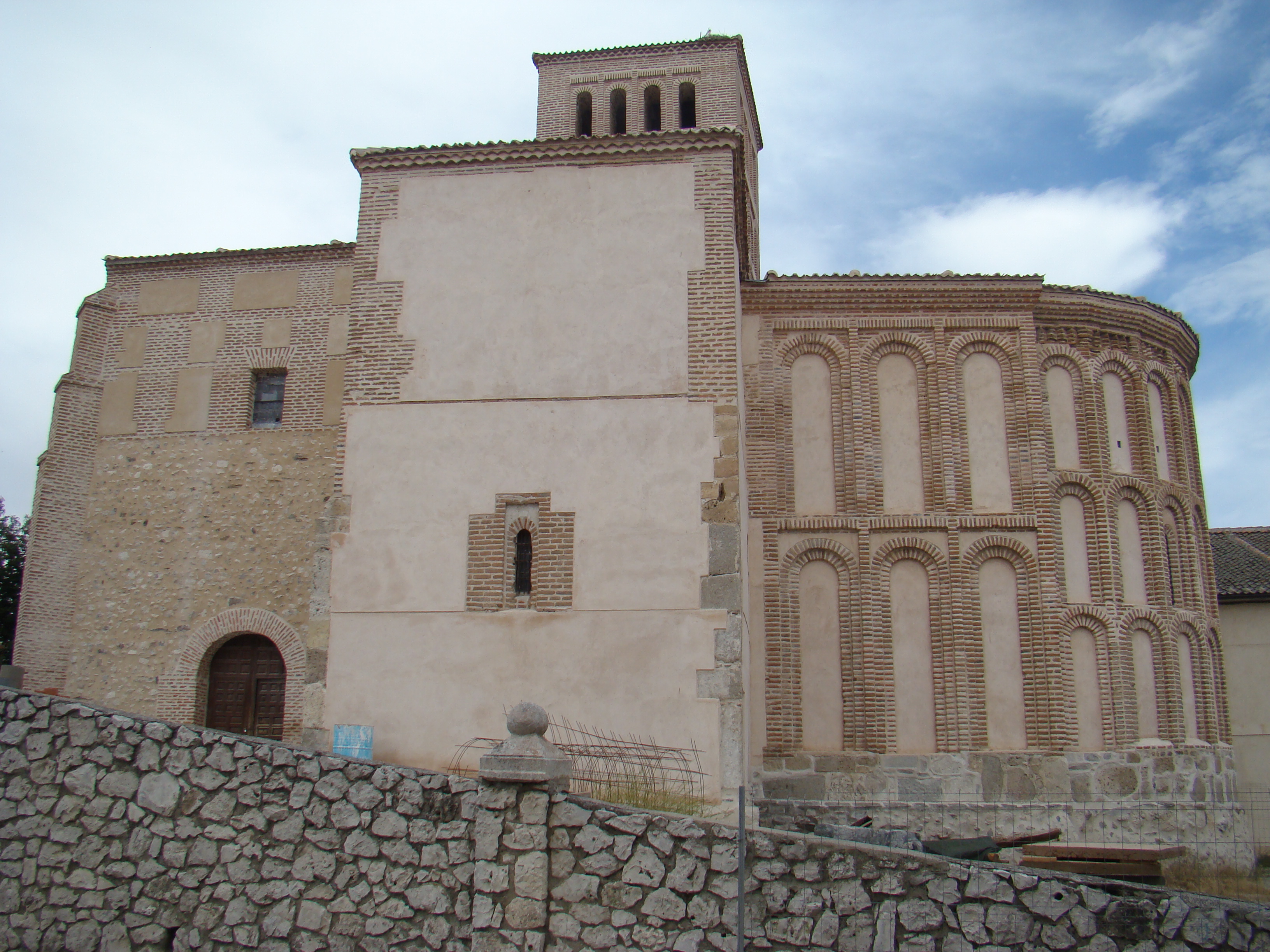 Iglesia mudéjar de Samboal de Carracielo del Pinar en la localidad segoviana de Samboal (España.